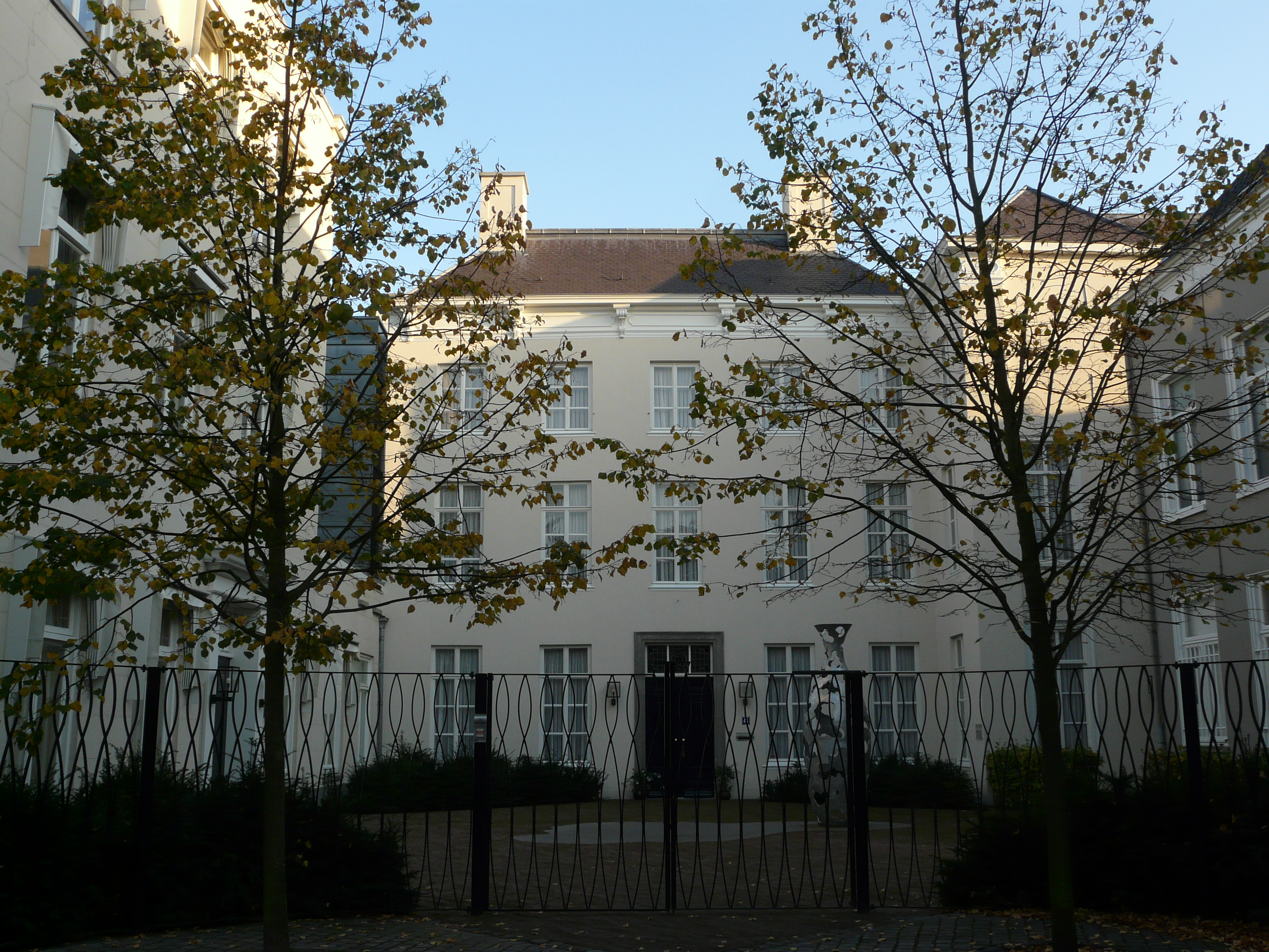 Zicht op een deel van het Bisschoppelijk Paleis (Breda) van het Bisdom Breda in de Veemarktstraat, Breda in het centrum van Breda